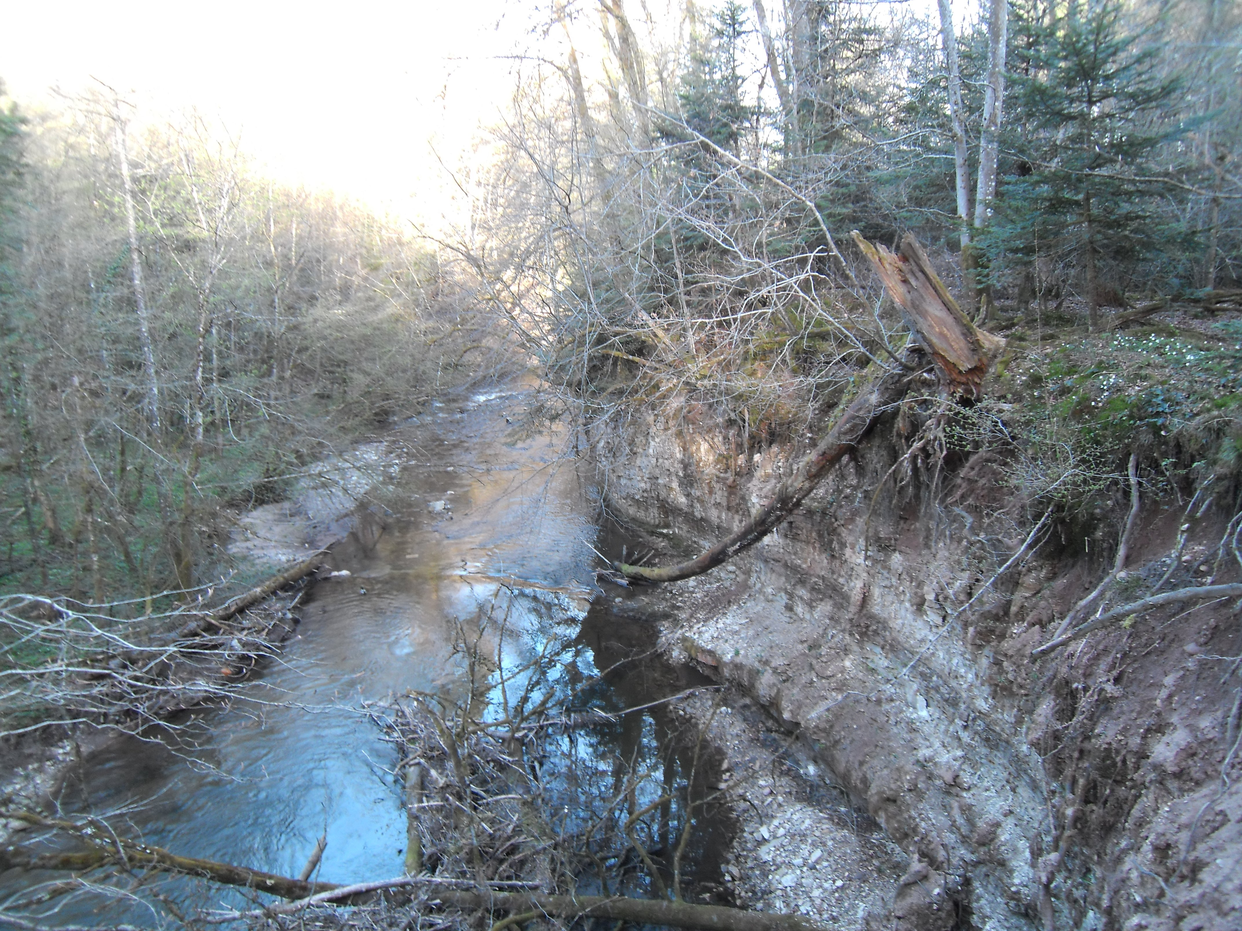 Steinaschlucht bei Tiengen